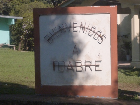 PARA SUBIR A UNA PAGINA